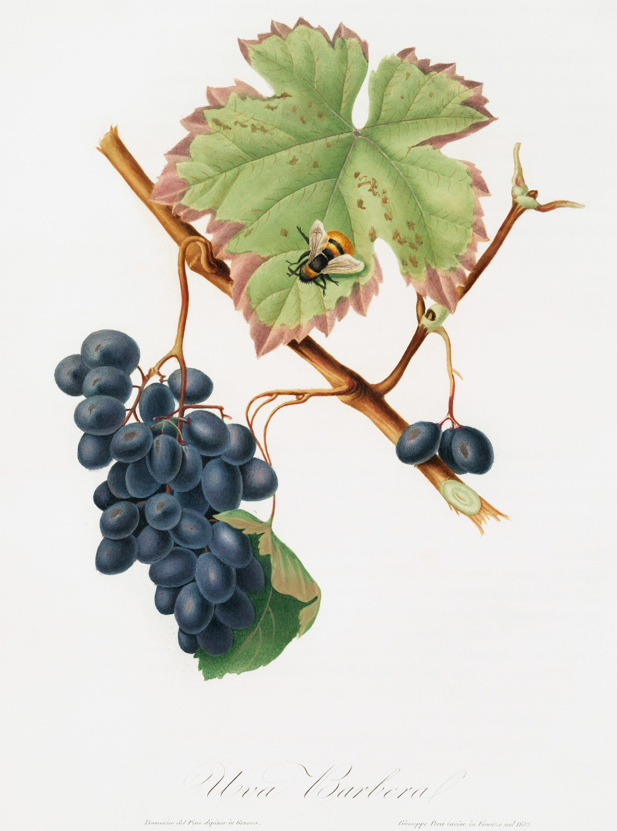 Uva Barbera descritta nella « Pomona Italiana » : Trattato degli alberi fruttiferi conteneate la descrizione delle megliori varietà dei frutte coltivati in Italia, accompagnato da figure disegnate, e colorite sul vero, opera di Giorgio Gallesio.